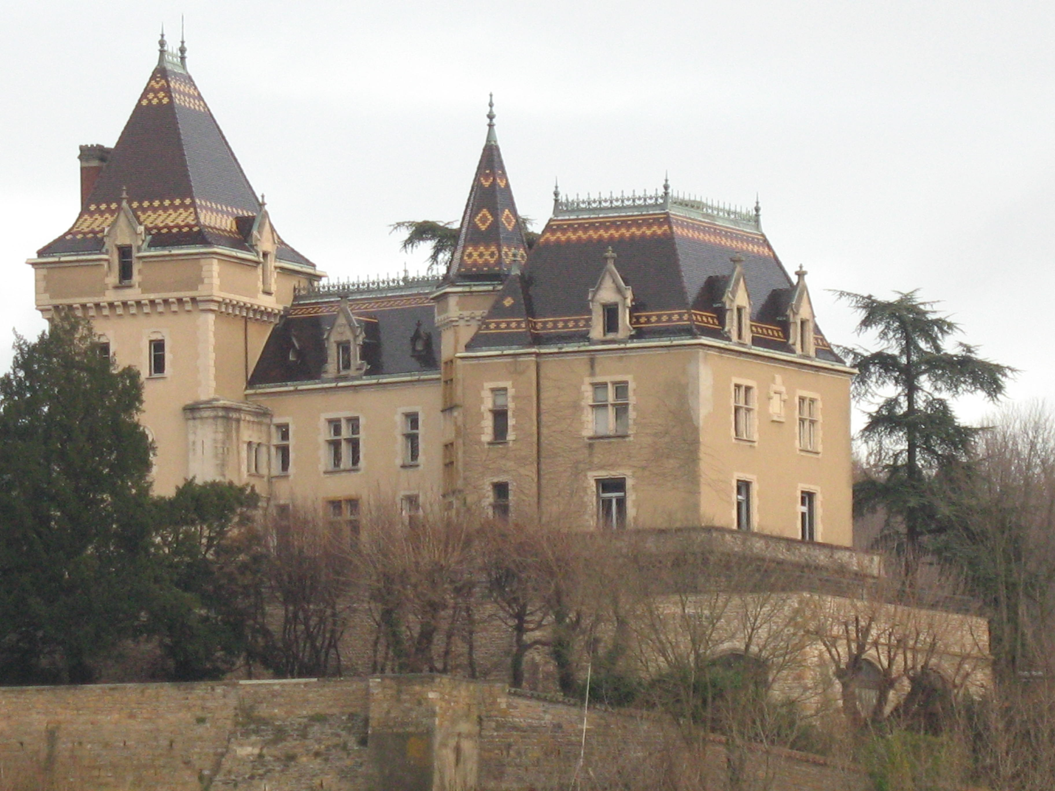 Le château de Rochetaillée-sur-Saône, dans le Rhône